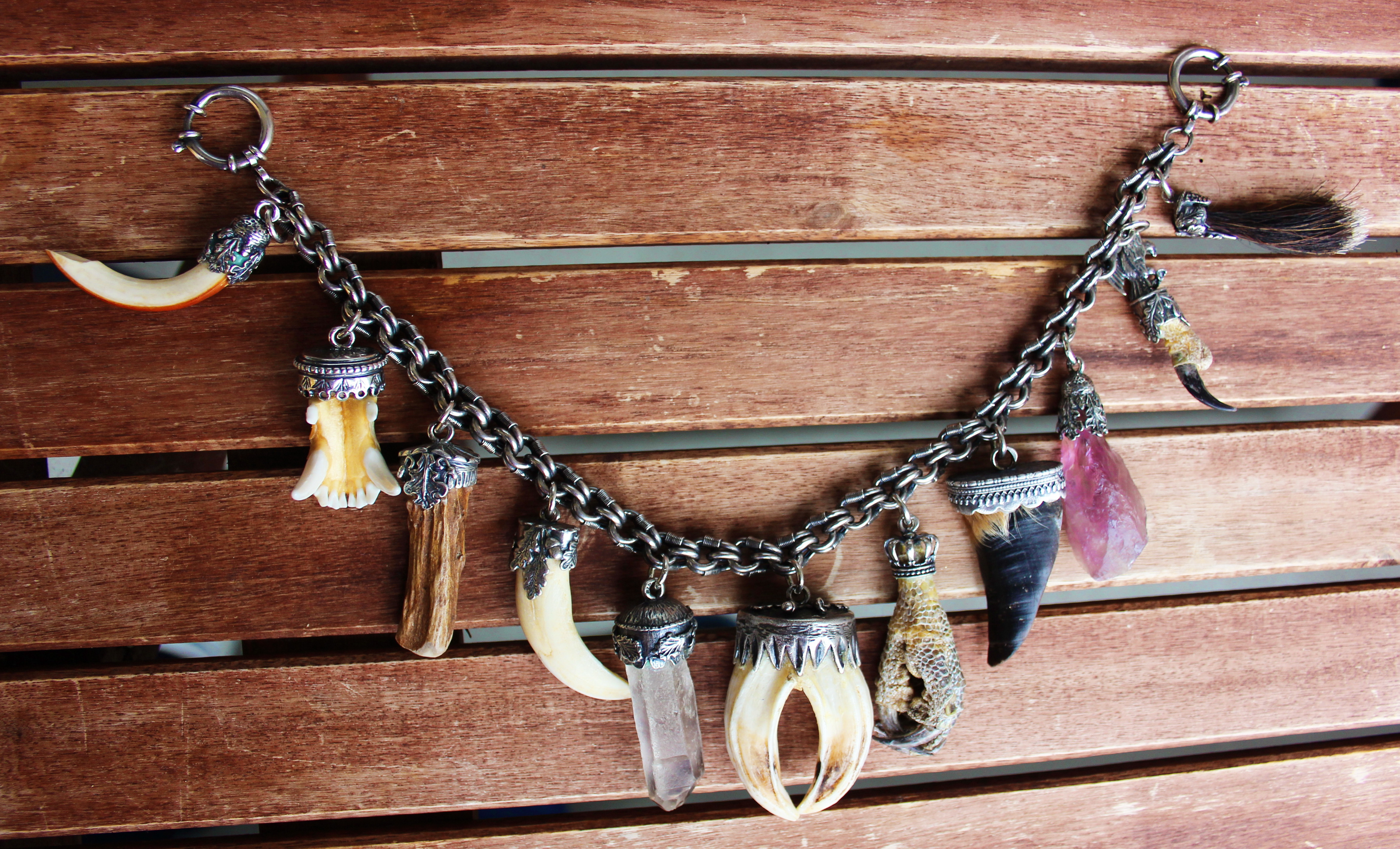 Charivari - Bauchkette. Von Links nach Rechtes: Nutriazahn, Gebiss, Rehstange, Widschweinzahn, Bergkristall, Wildschweinhauer, Vogelkralle, Ametist, Adlerkralle, Gambsbart